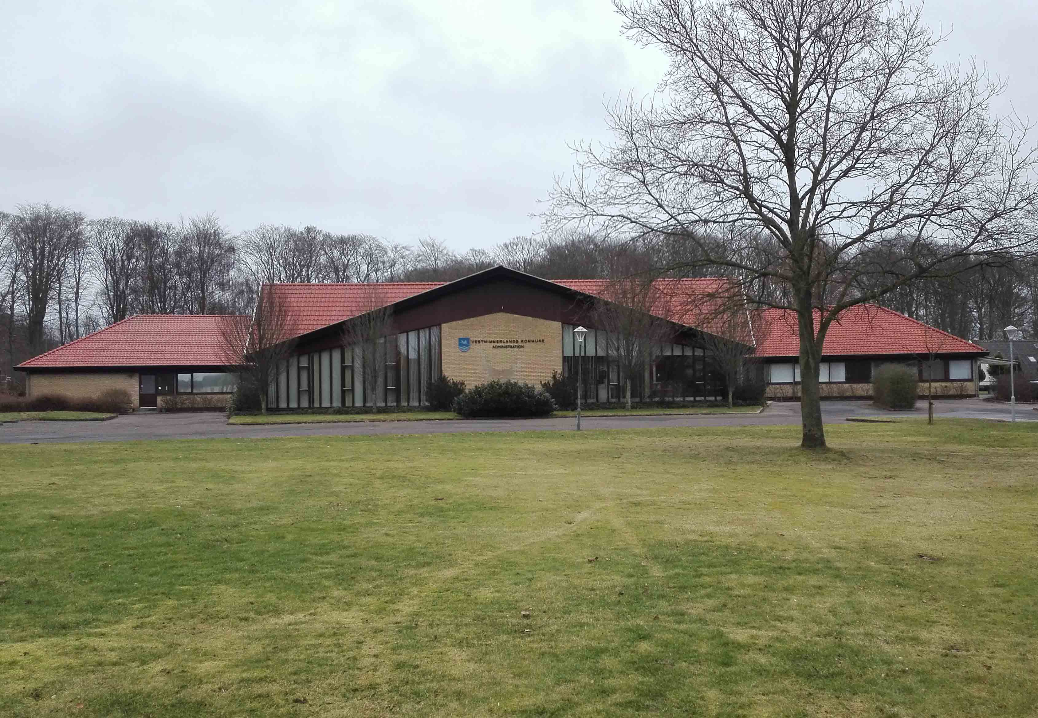 Den tidligere Aalestrup Kommunes rådhus på Aagade 25D, nu en administrationsbygning i Vesthimmerlands Kommune